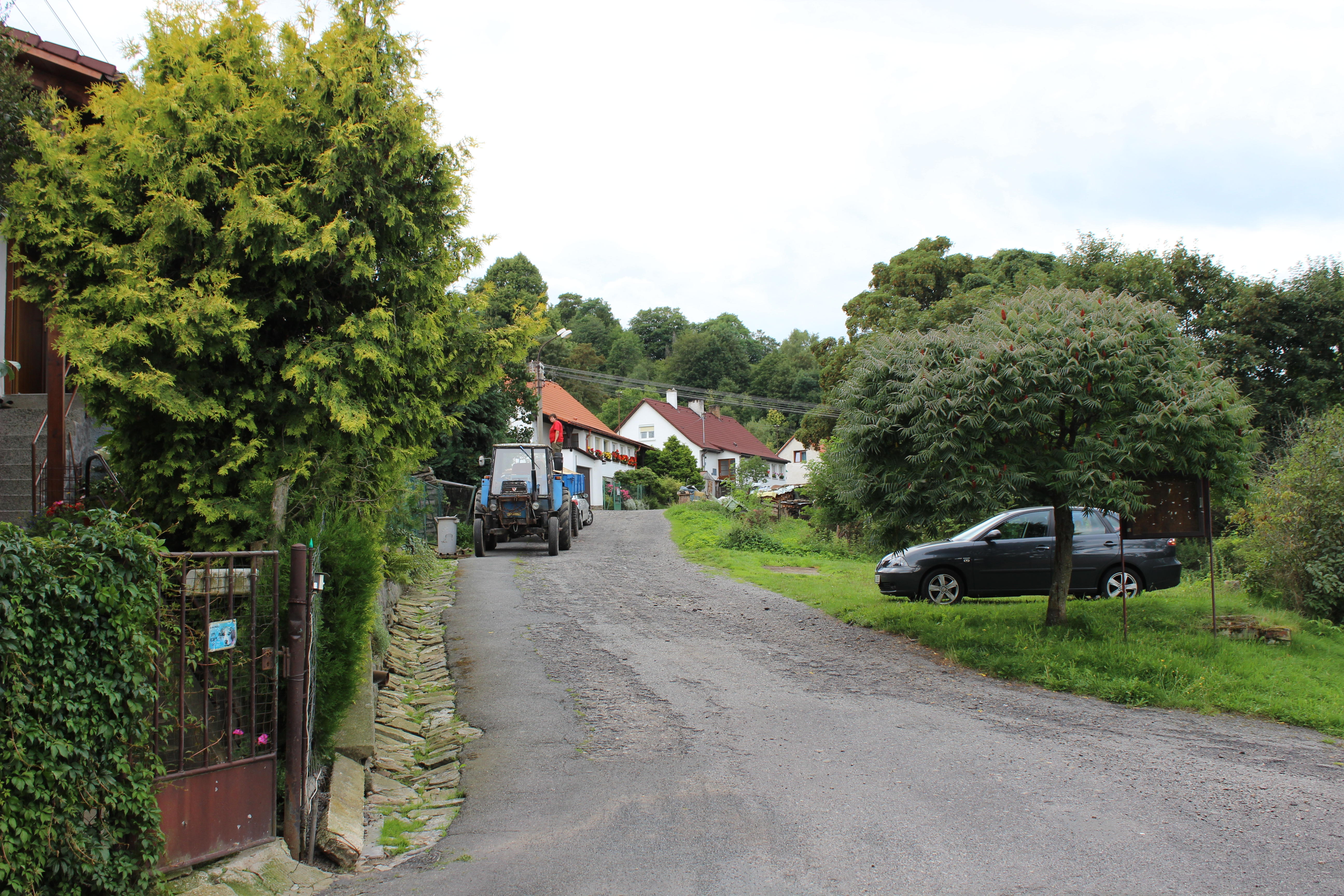 Zástavba v Hořejším Krušci, části Hartmanic v klatovském okrese.